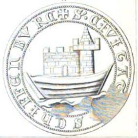 Schippenbeil (früher Schiffenburg), Siegelabdruck der Stadt in Ostpreußen aus dem Jahr 1351 mit der Umschrift S'. CIVITATIS SCHIFFENBURG